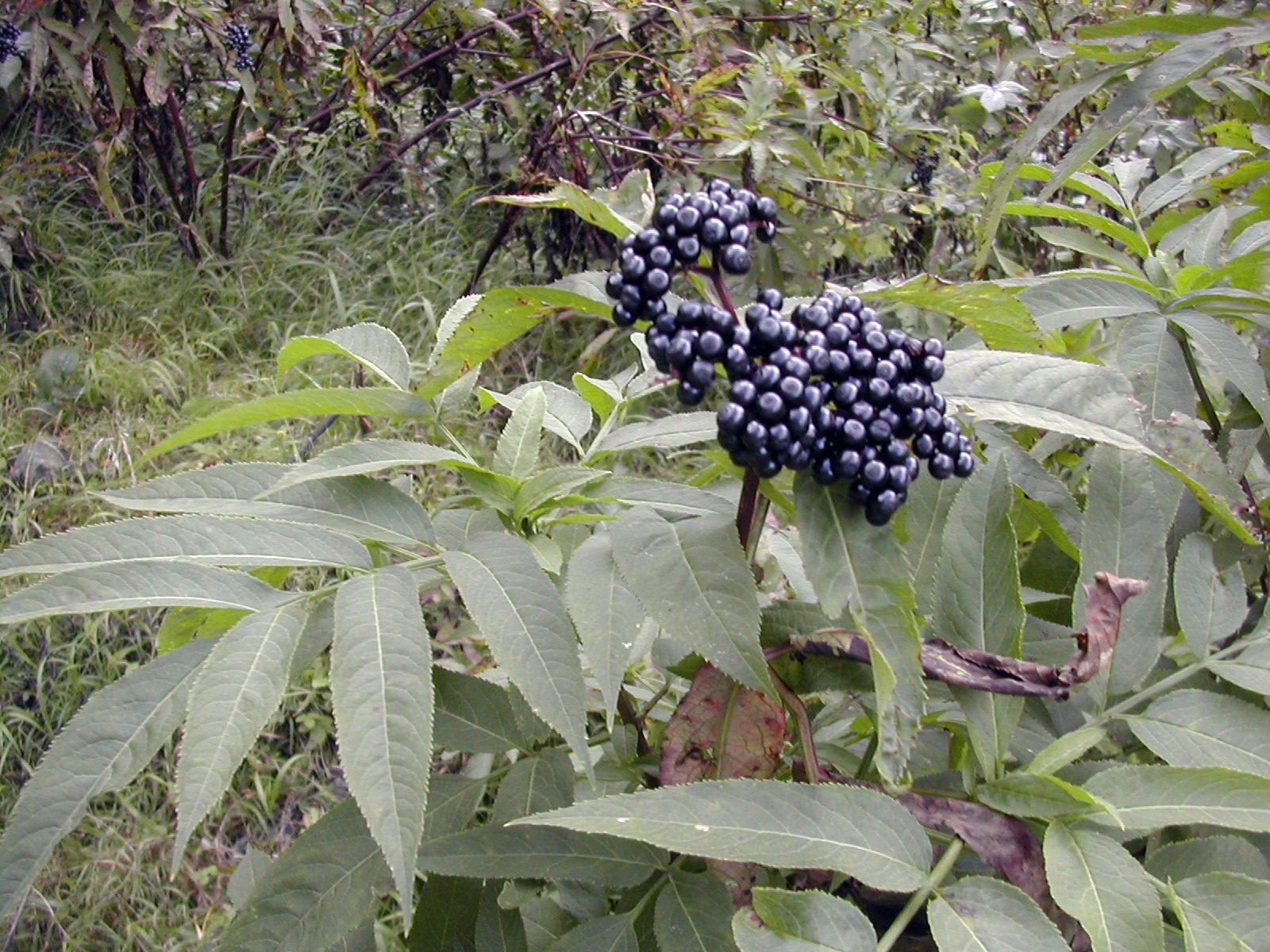 Sambucus ebulus fruit